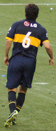 Ezequiel Muñoz jugando en Boca Juniors